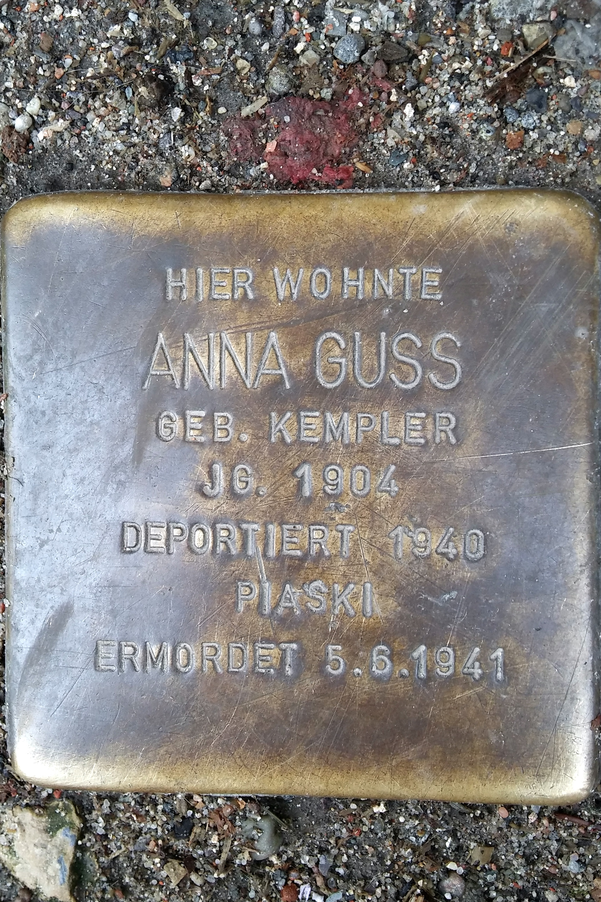 Stralsund, Badenstraße 41, Stolperstein Anna Guss (2017-02-22)